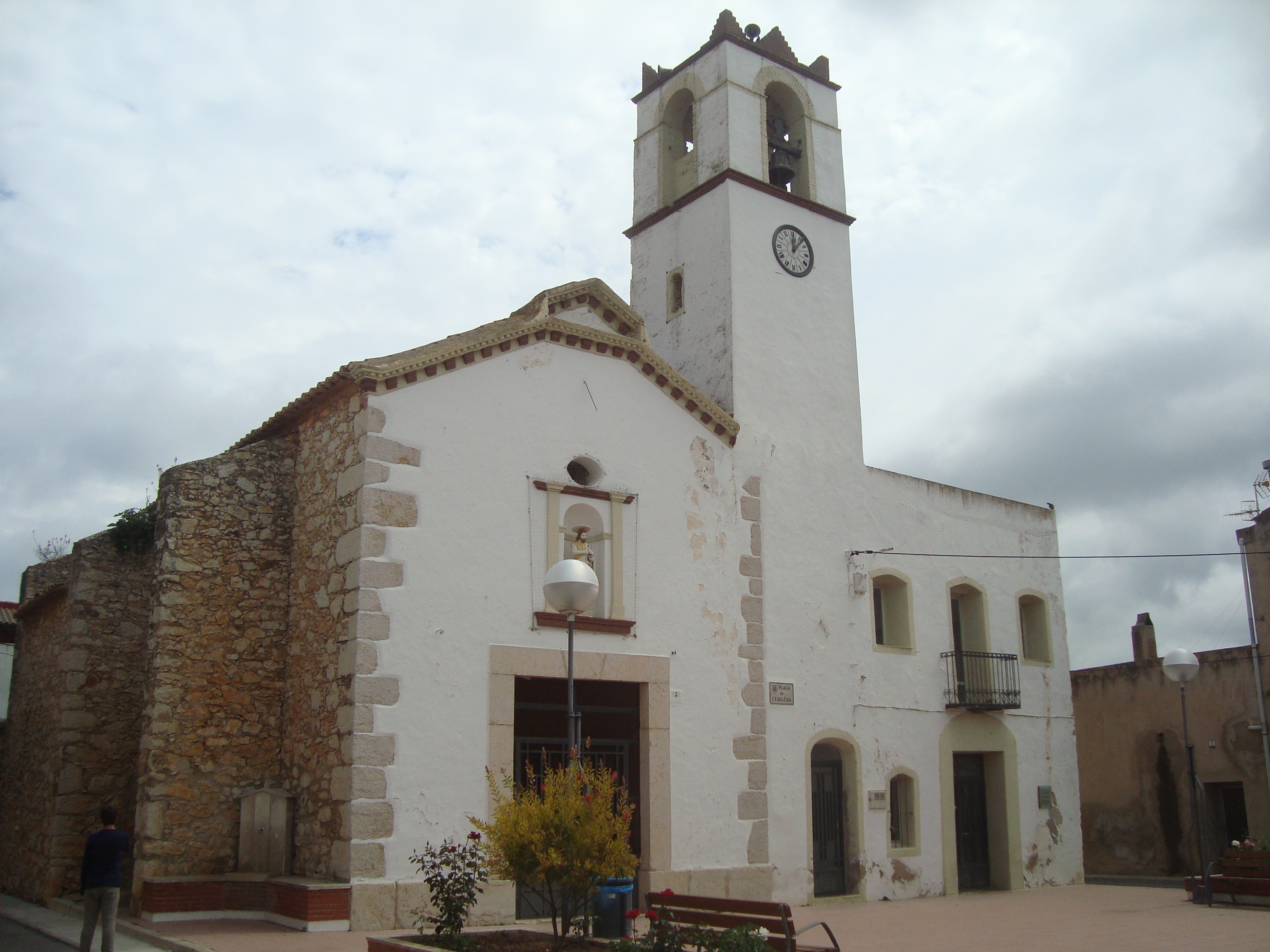 Església de Sant Joan Baptista (Ulldecona)